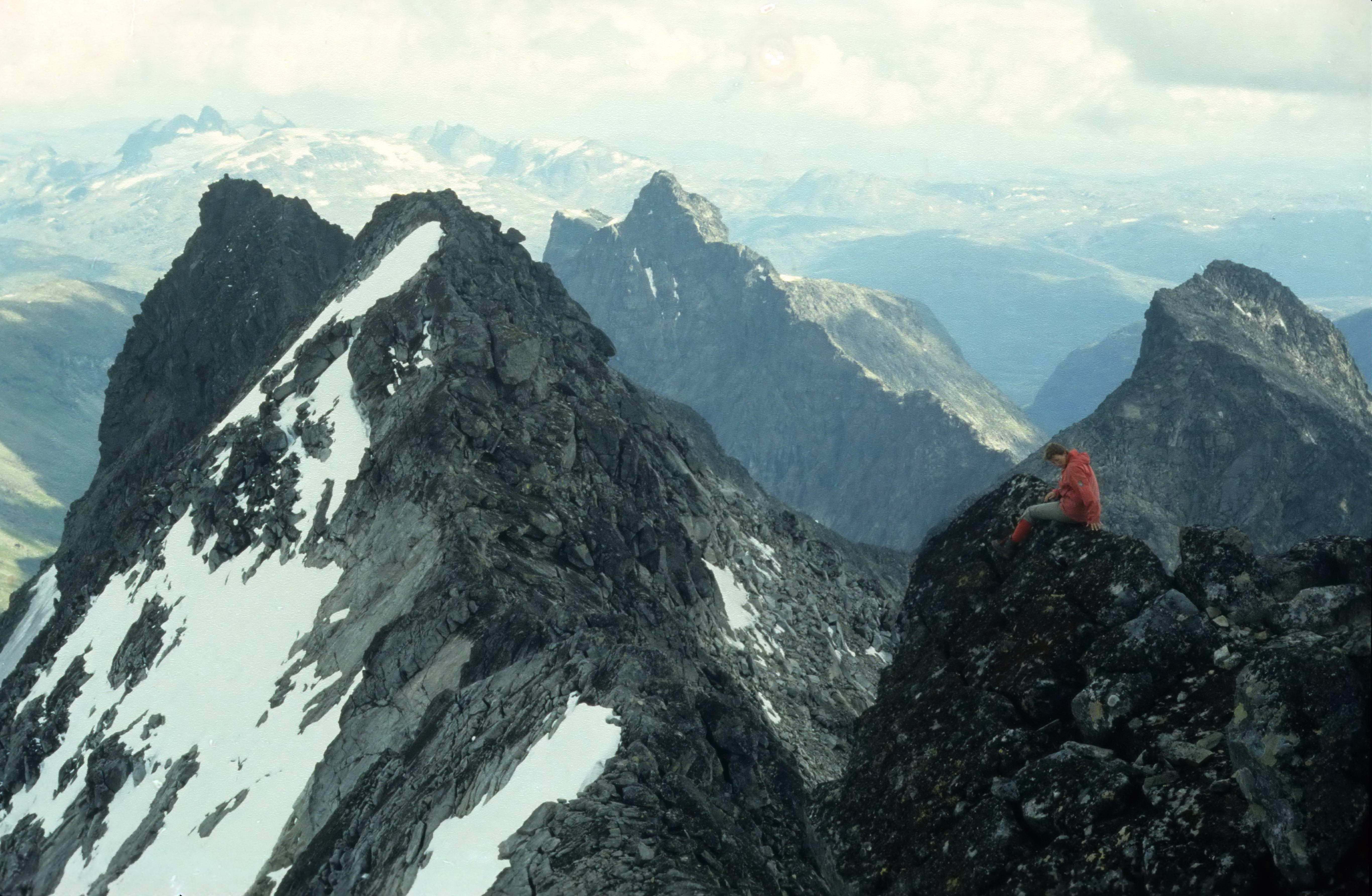 Sydover Dyrhaugsryggen fra Store Dyrhaugstind